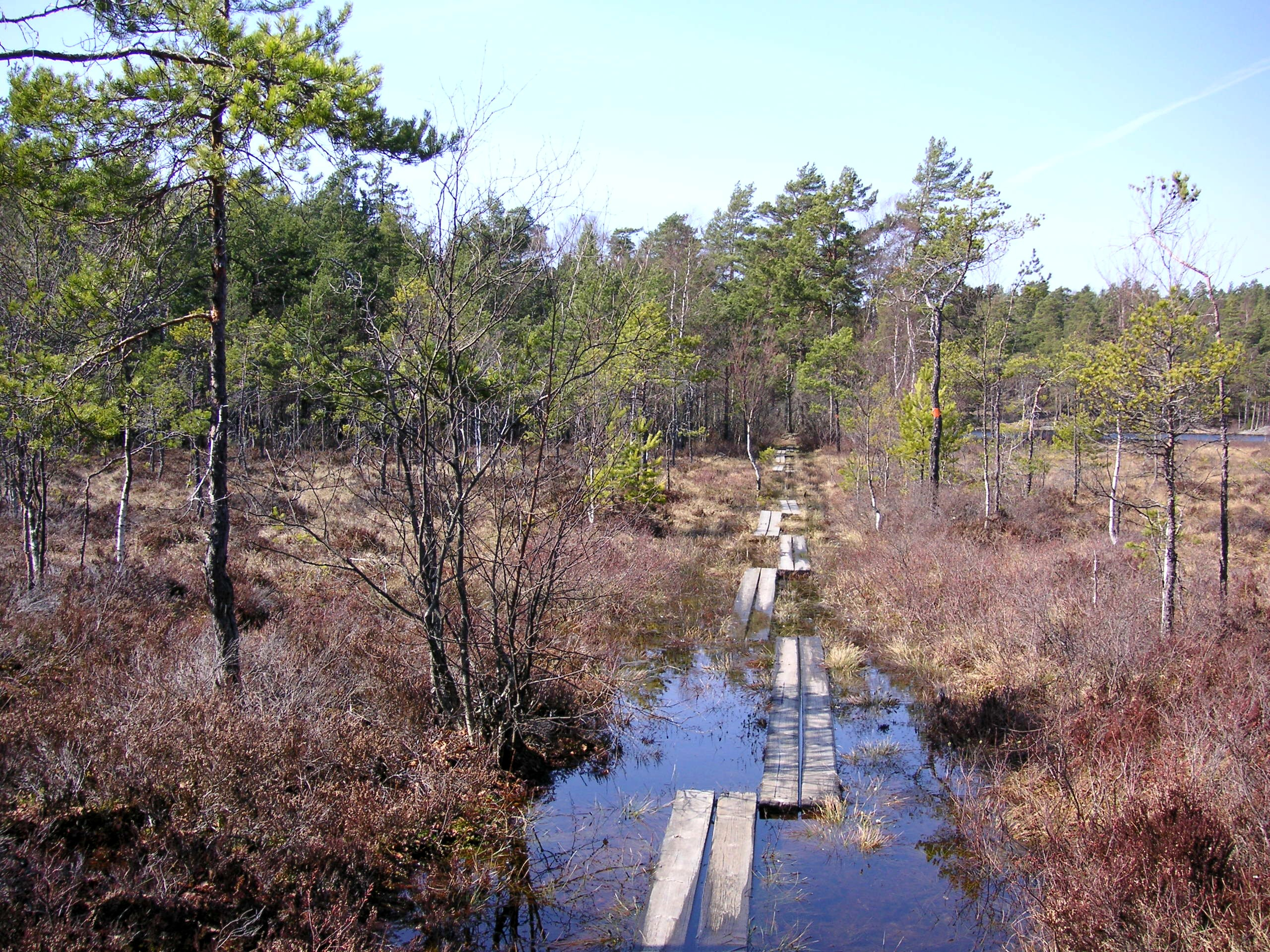 Vid sjön Gömmaren i Huddinge